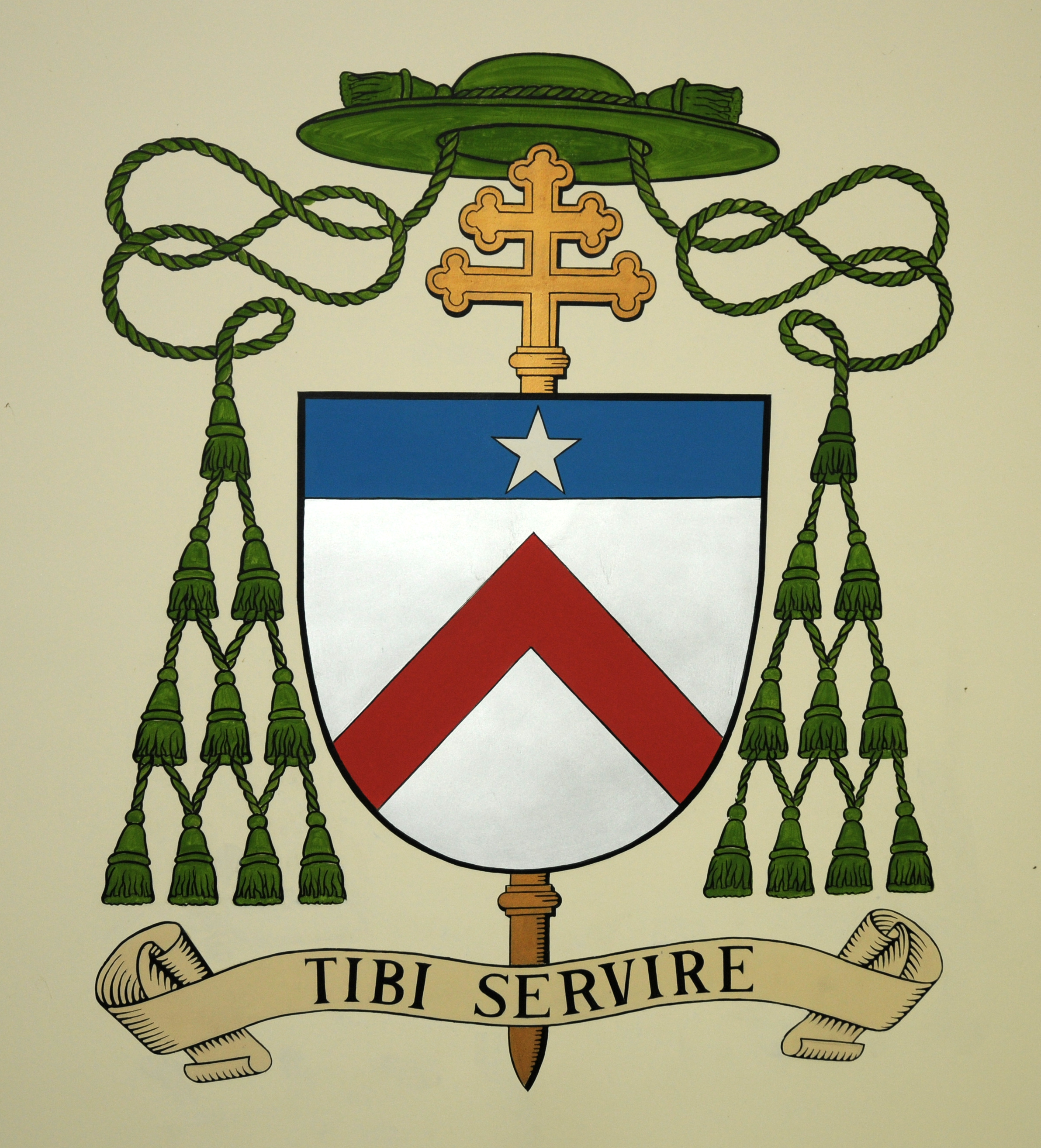 De Wope vum Äerzbëschof Jean Hengen, an der Parkierch zu Diddeleng.